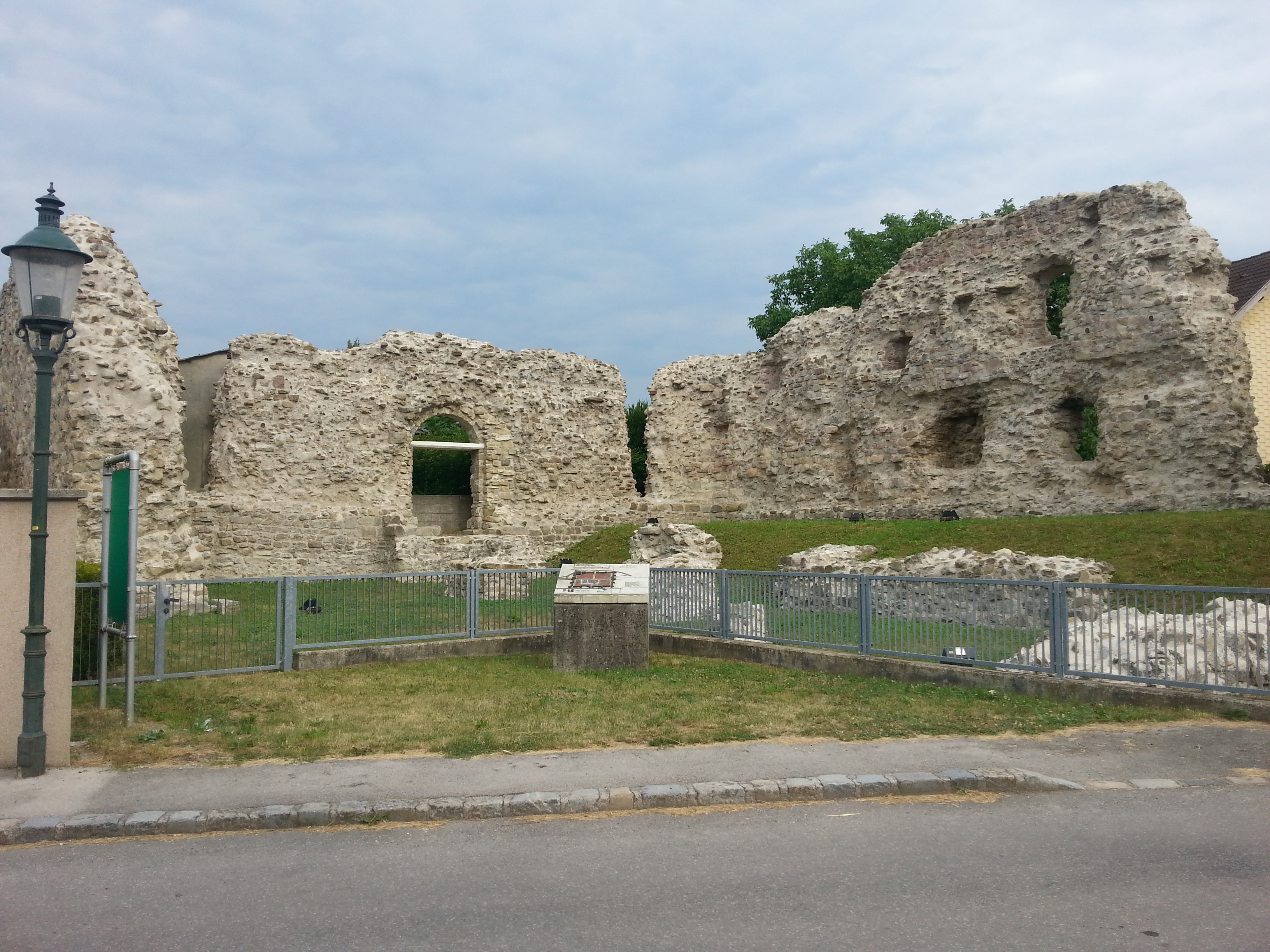 Schaugelände des spätrömischen Burgus von Zeiselmauer, Niederösterreich, Zustand 2018.